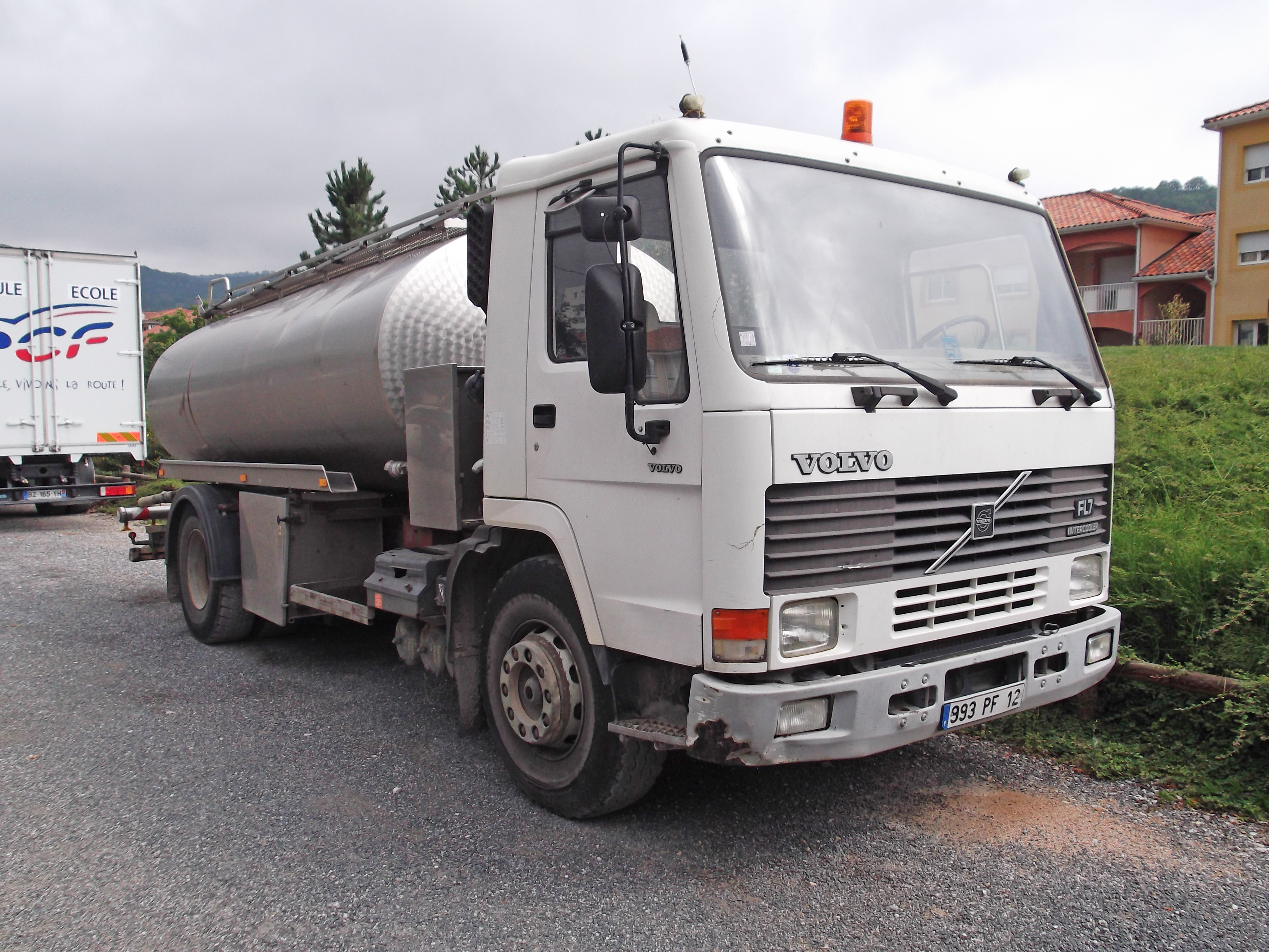 Volvo FL 7